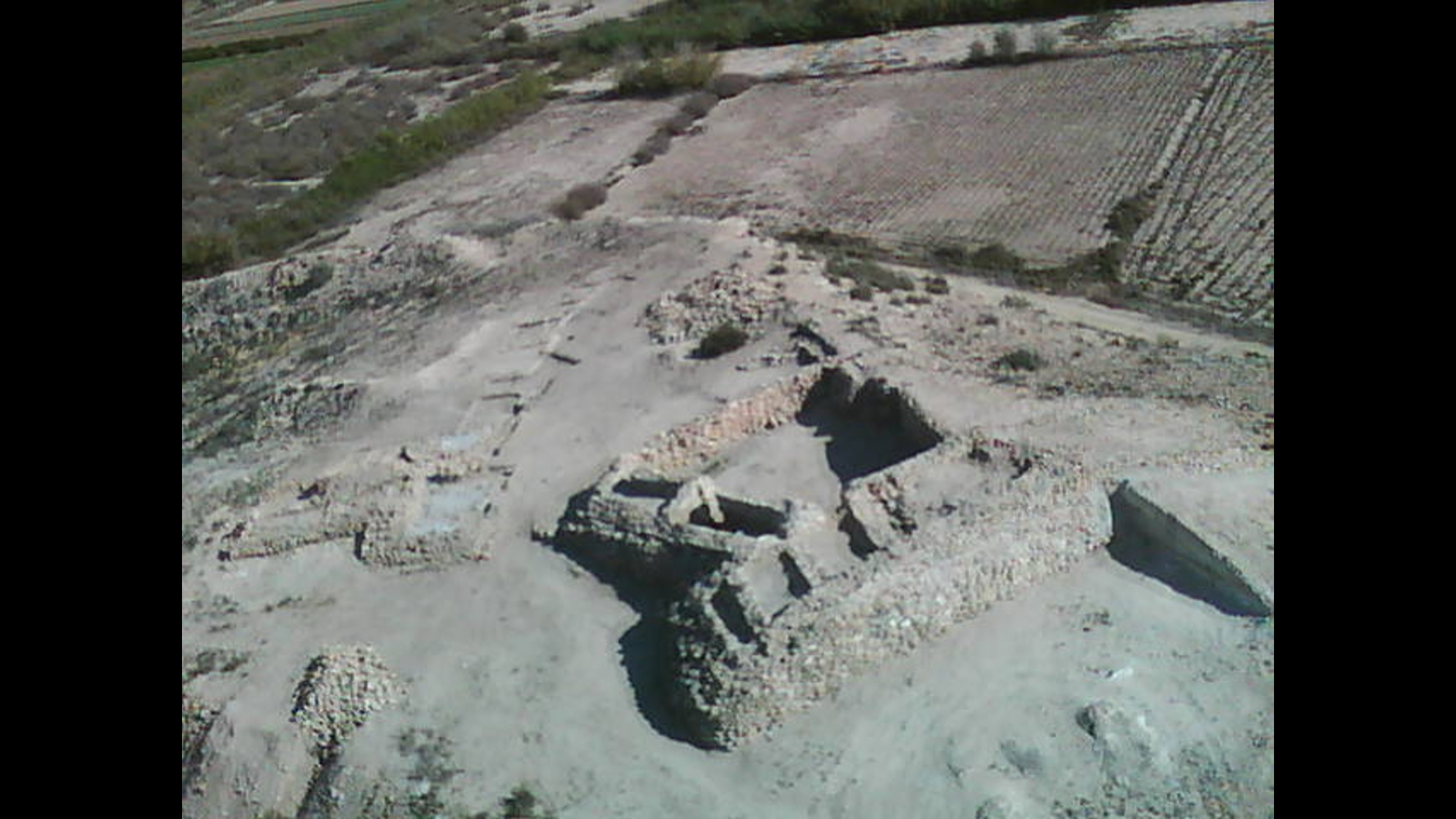 Vista aérea de la fortaleza fenicia del Cabezo pequeño del estaño.